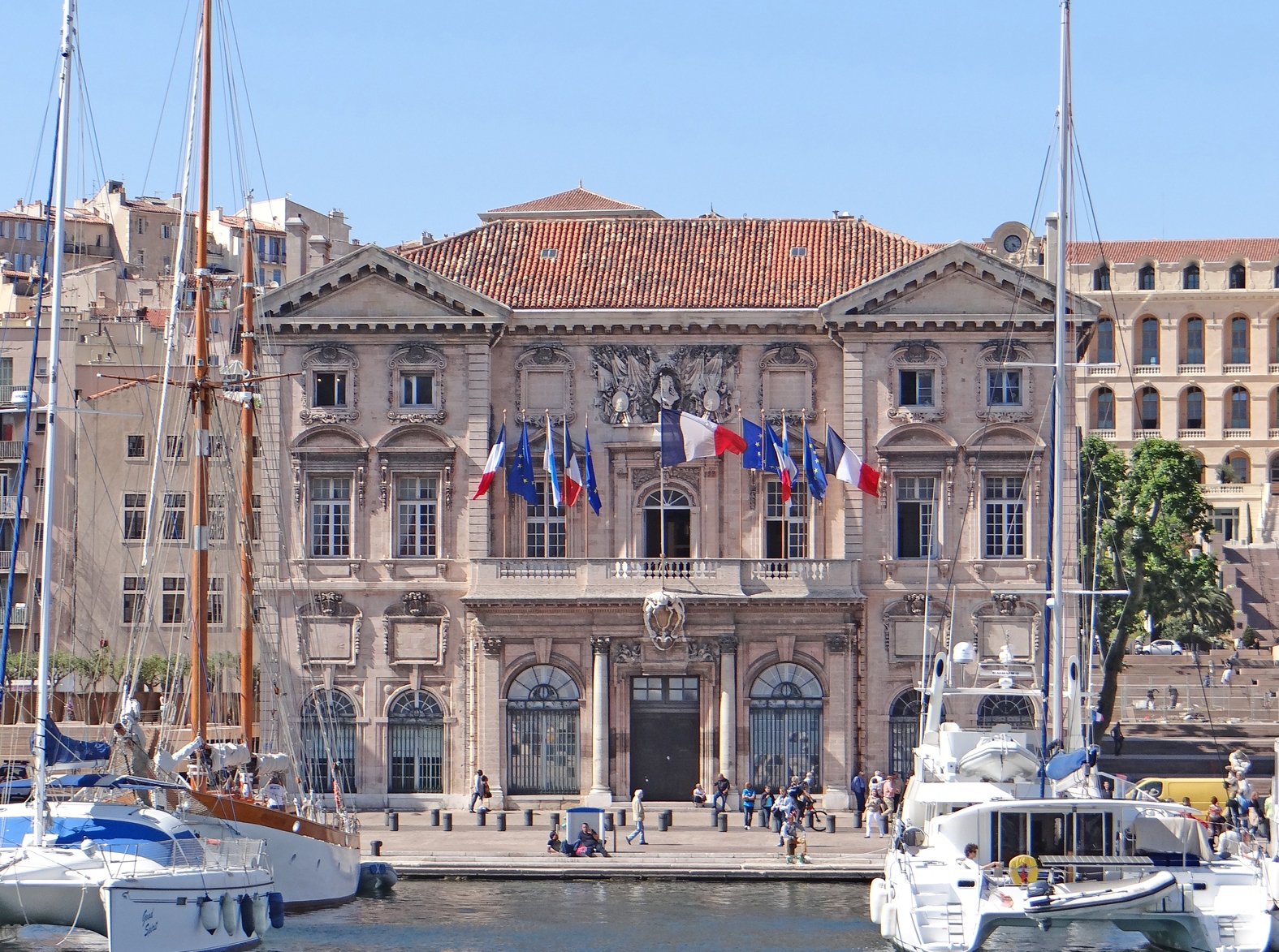 L'hôtel de ville vu depuis le bassin du Vieux-Port Le projet d’édifice destiné à abriter l'hôtel de ville date de 1653 mais ce n'est qu'en 1666, que Gaspard Puget, frère de Pierre Puget, reprend le projet. Les sculpteurs François et Mathieu Pourtal (ou Portal), Martinet, Levaquery et Martin Grosfils travaillent aux ornements de la façade. Pierre Puget ne réalise en 1673 que l’écusson placé au-dessus de la porte principale. L’hôtel de ville ne fut effectivement occupé que fin septembre 1673. Il a échappé aux destructions des nazis en 1943 alors que tous les immeubles autour de lui ont été dynamités.